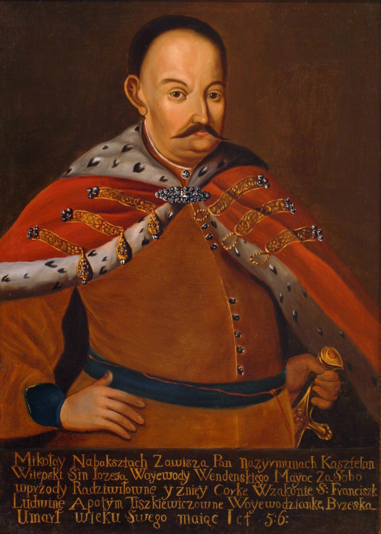 Беларуская (тарашкевіца): Партрэт Мікалая Завішы (Mikałaj Zaviša) гербу «Лебедзь» (каля 1585 — 1647), дзяржаўнага дзеяча Вялікага Княства Літоўскага, рэфэрэндара сьвецкага, кашталяна віцебскага